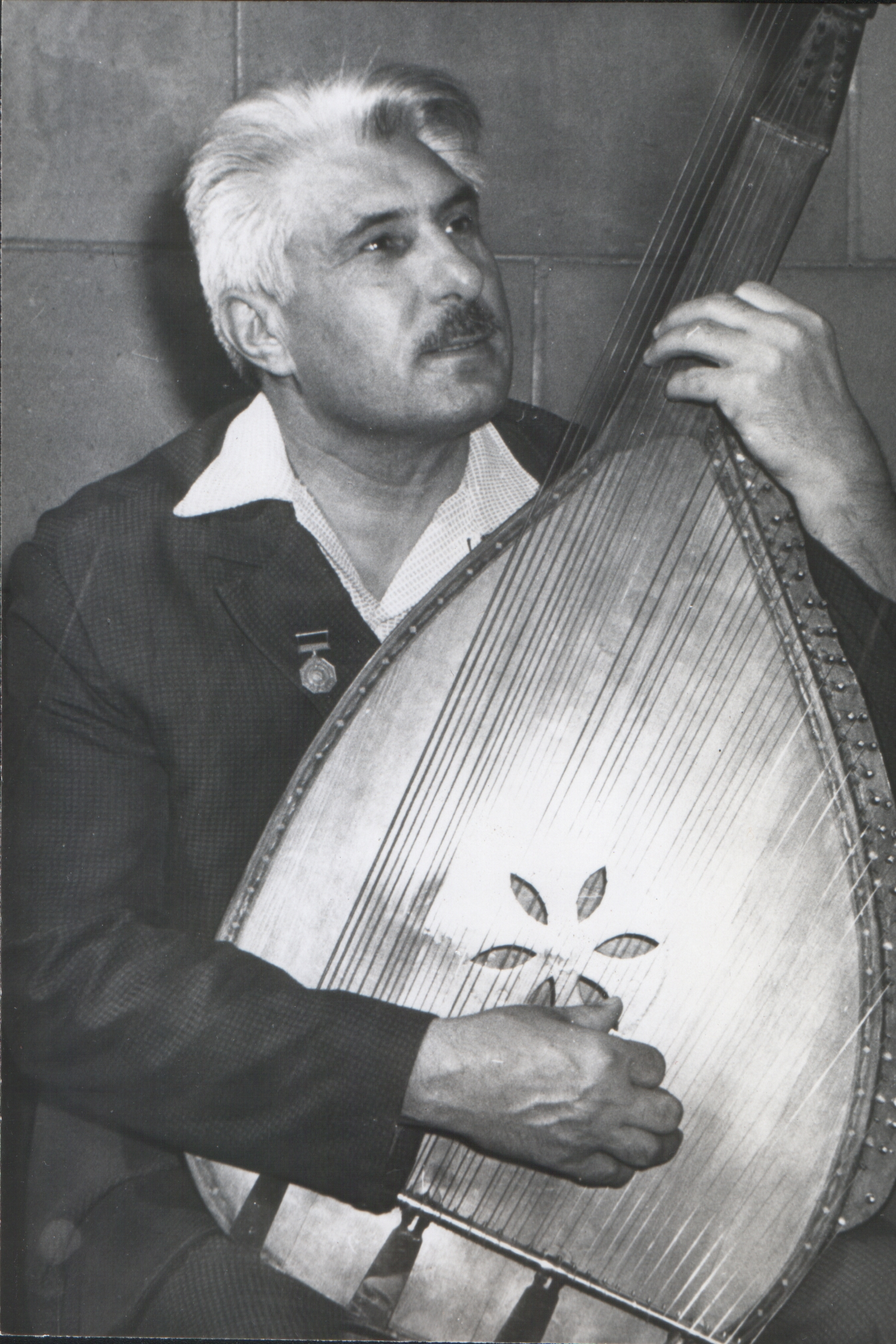 Бобир Андрій Матвійович Народний артист України, Бандурист, Диригент